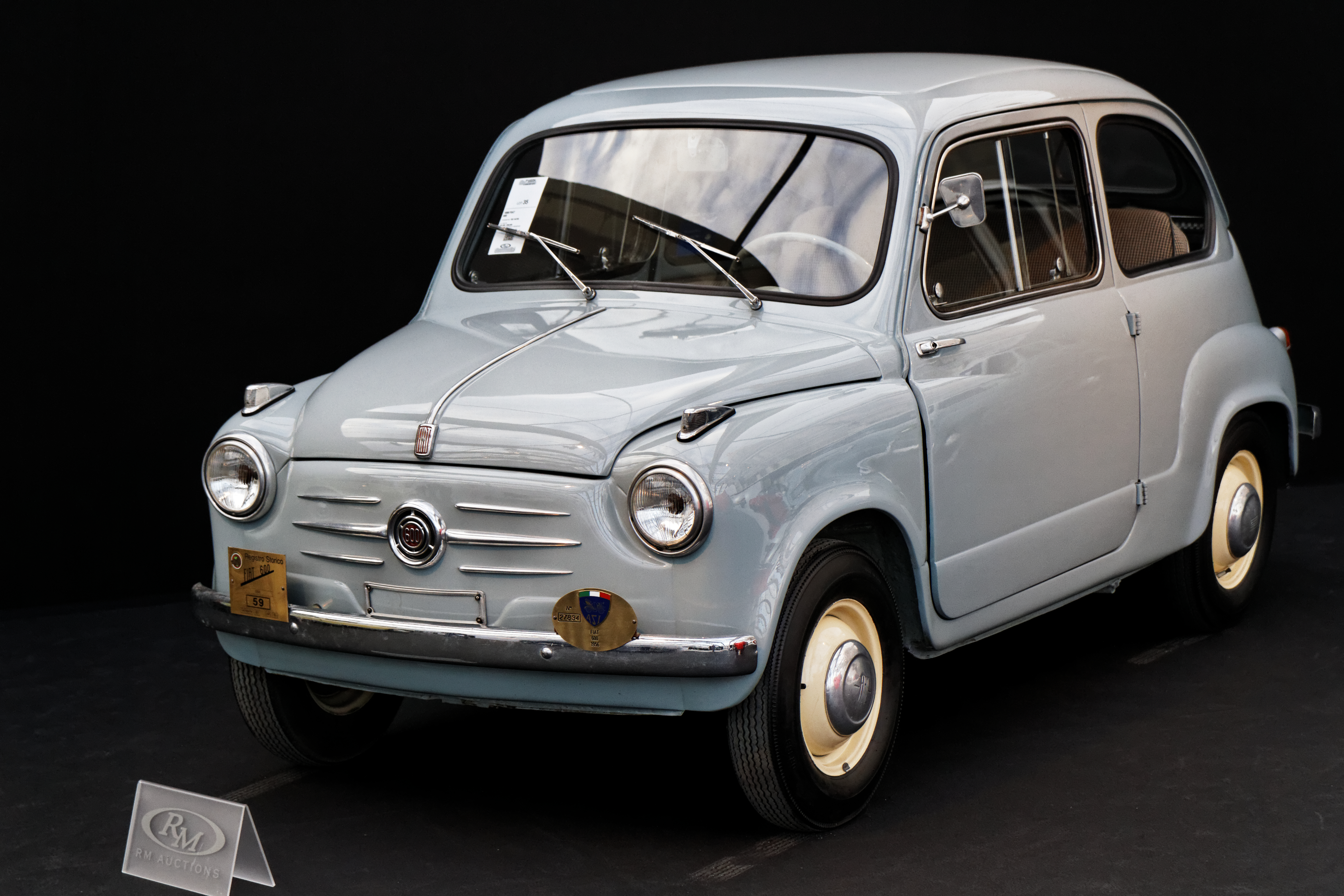 Une Fiat 600 de 1956.